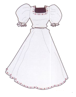 Vestido Típico tradicional del municipio - Iturbide, Nuevo León, México